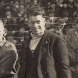 Frederick Warburton voor de interland tegen Frankrijk.